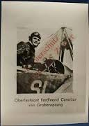 Feldpilot Major a.D. Ferdinand von Cavallar